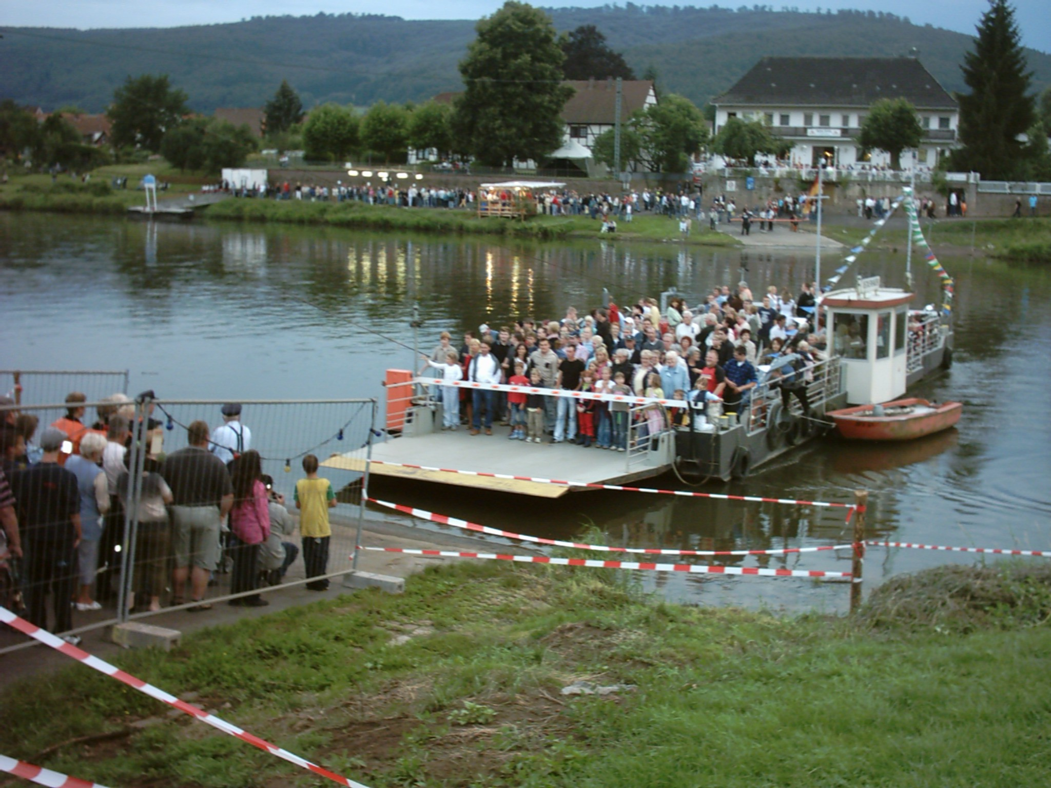 Zuschauerandrang auf der Weserfähre Reinhardshagen-Hemeln am Abend der Weserbeleuchtung.